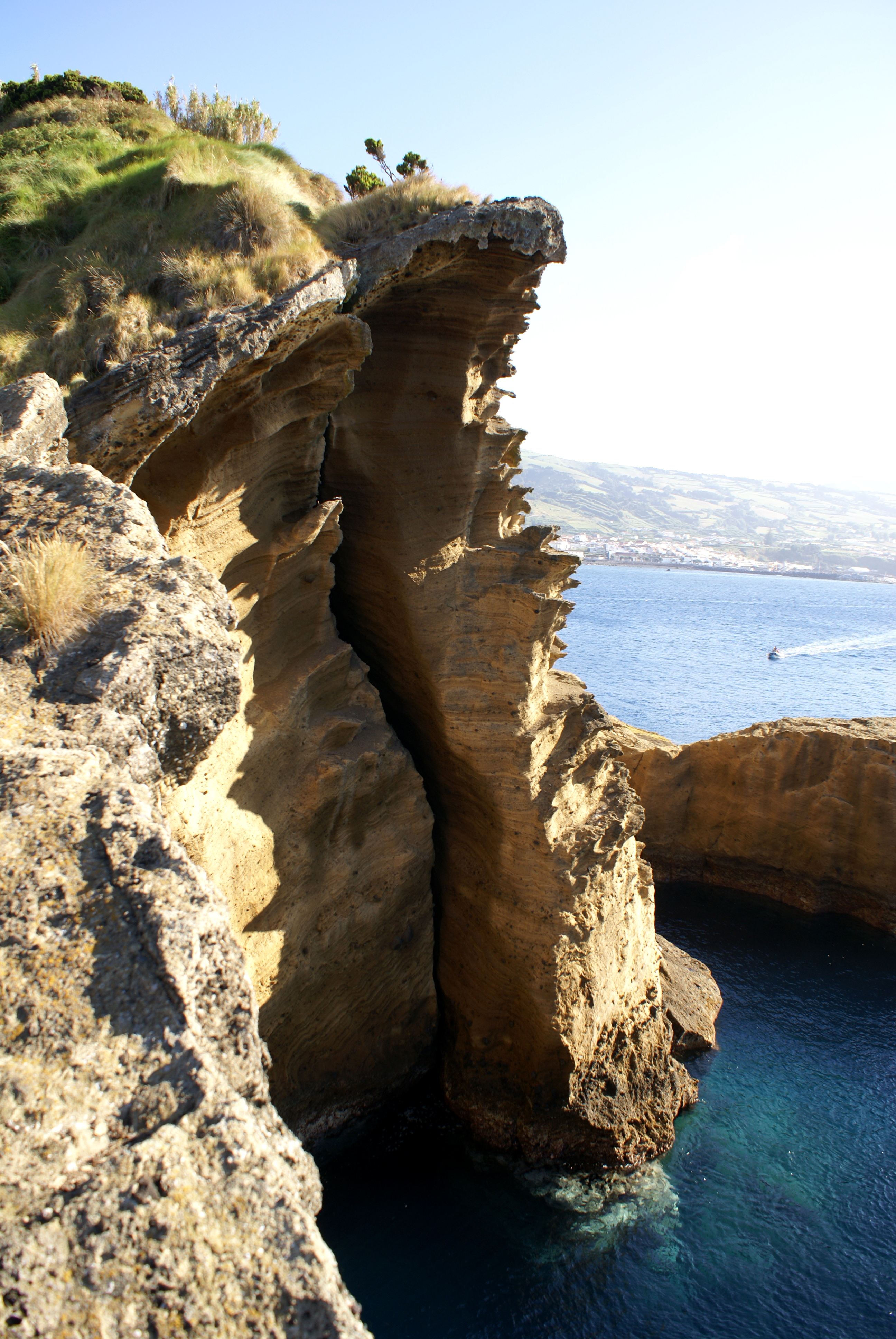 Ilhéu de Vila Franca do Campo, aspectos, Vila Franca do Campo, ilha de São Miguel, Açores